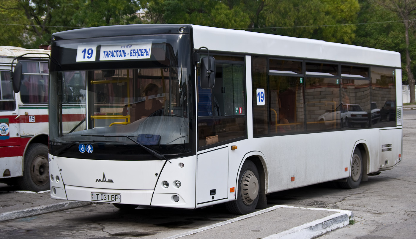 Новый автобус МАЗ. Они появились на приднестровских дорогах 24 сентября 2012. Эксплуатируются на 19 маршруте. Между городами Тирасполь и Бендеры.